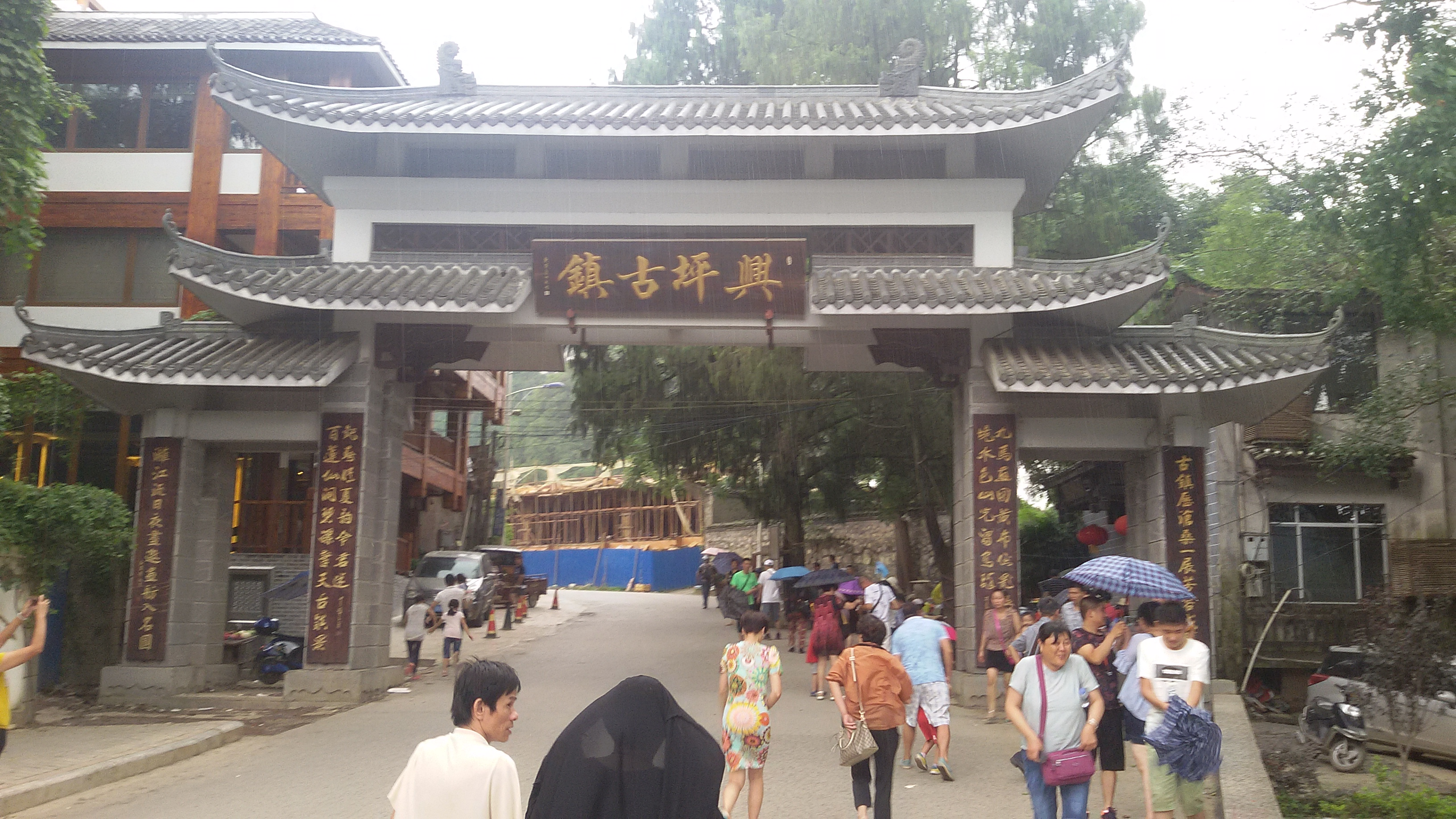 粵語: 興坪古鎮牌坊（西邊嗰嚿）